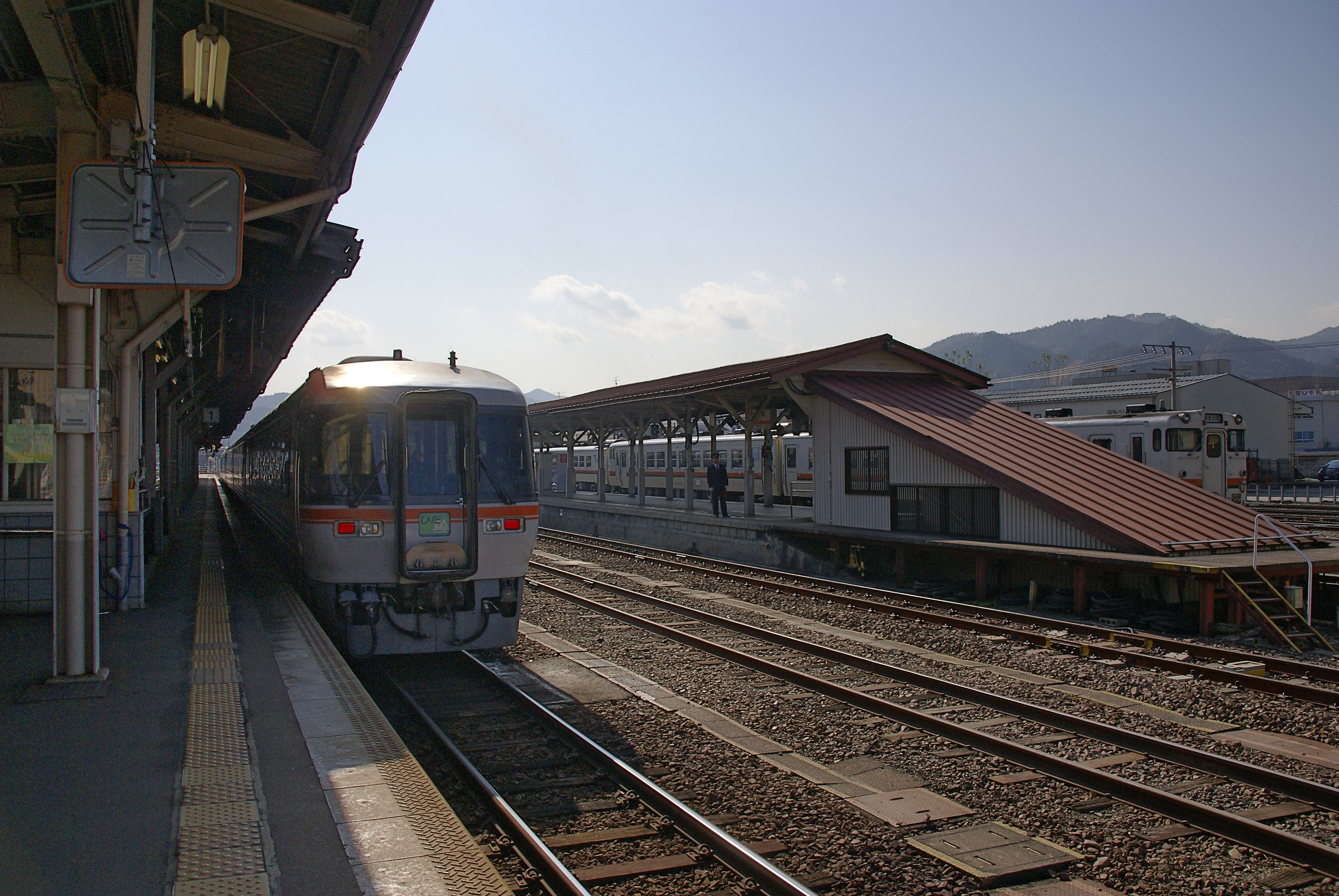 Takayama Station in Takayama, Gifu prefecture, Japan